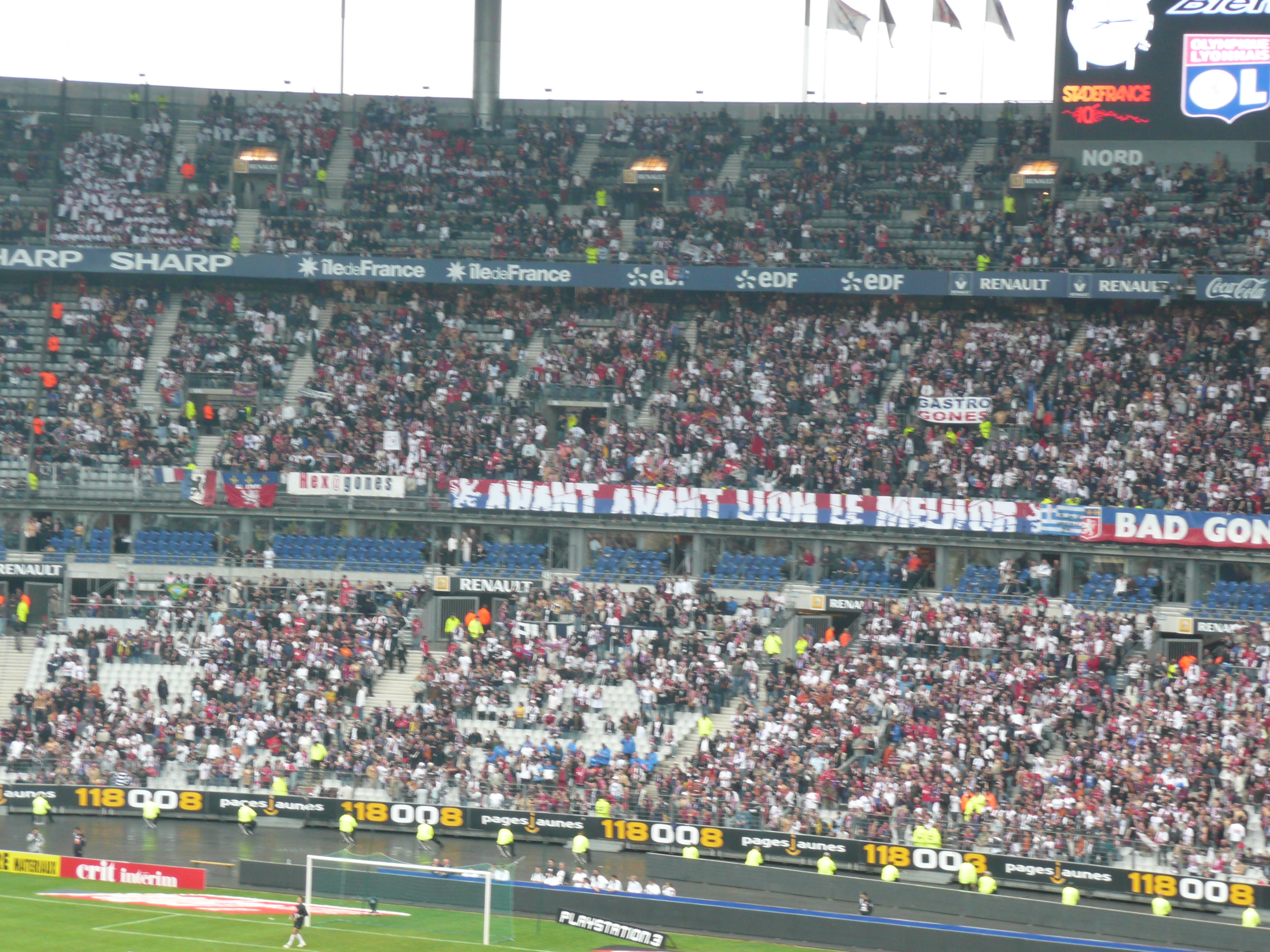 Olympique lyonnais fans during the Coupe de France 2007-2008 final against Paris Saint-Germain at the Stade de France